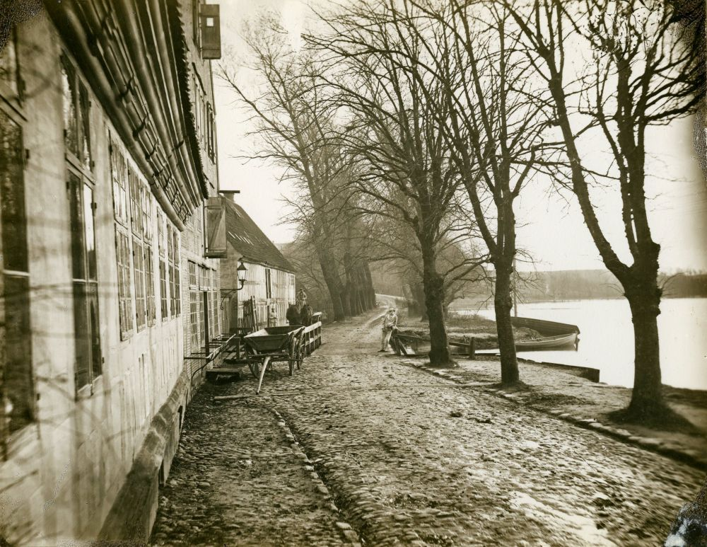 Aarhus Mølle ved Vester Allé omkring 1860. Til ses Mølledammen. Fotograf Andreas Fritz, Aarhus Stadsarkivs Samling